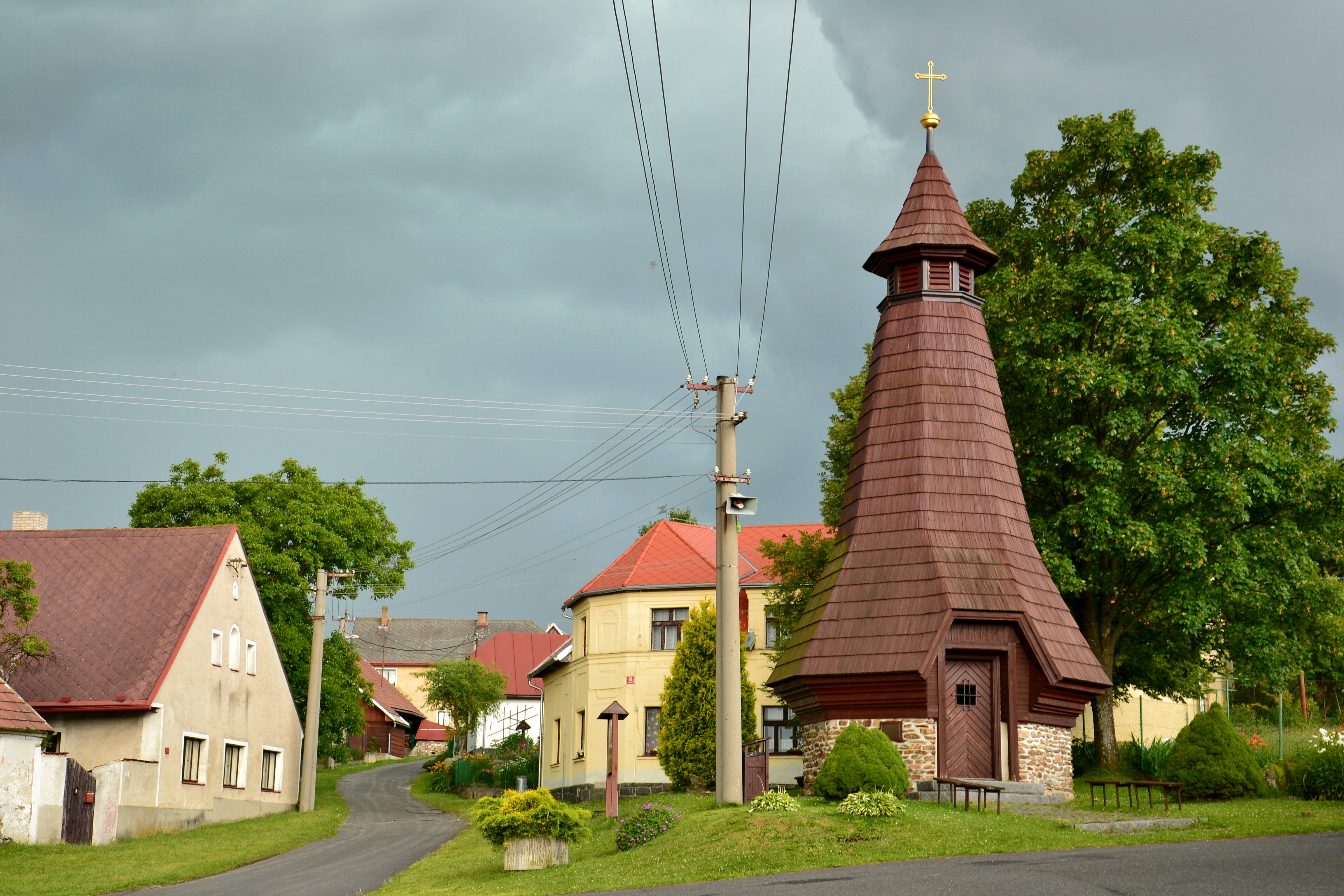 Pohorsko - náves s kaplí svatého Prokopa